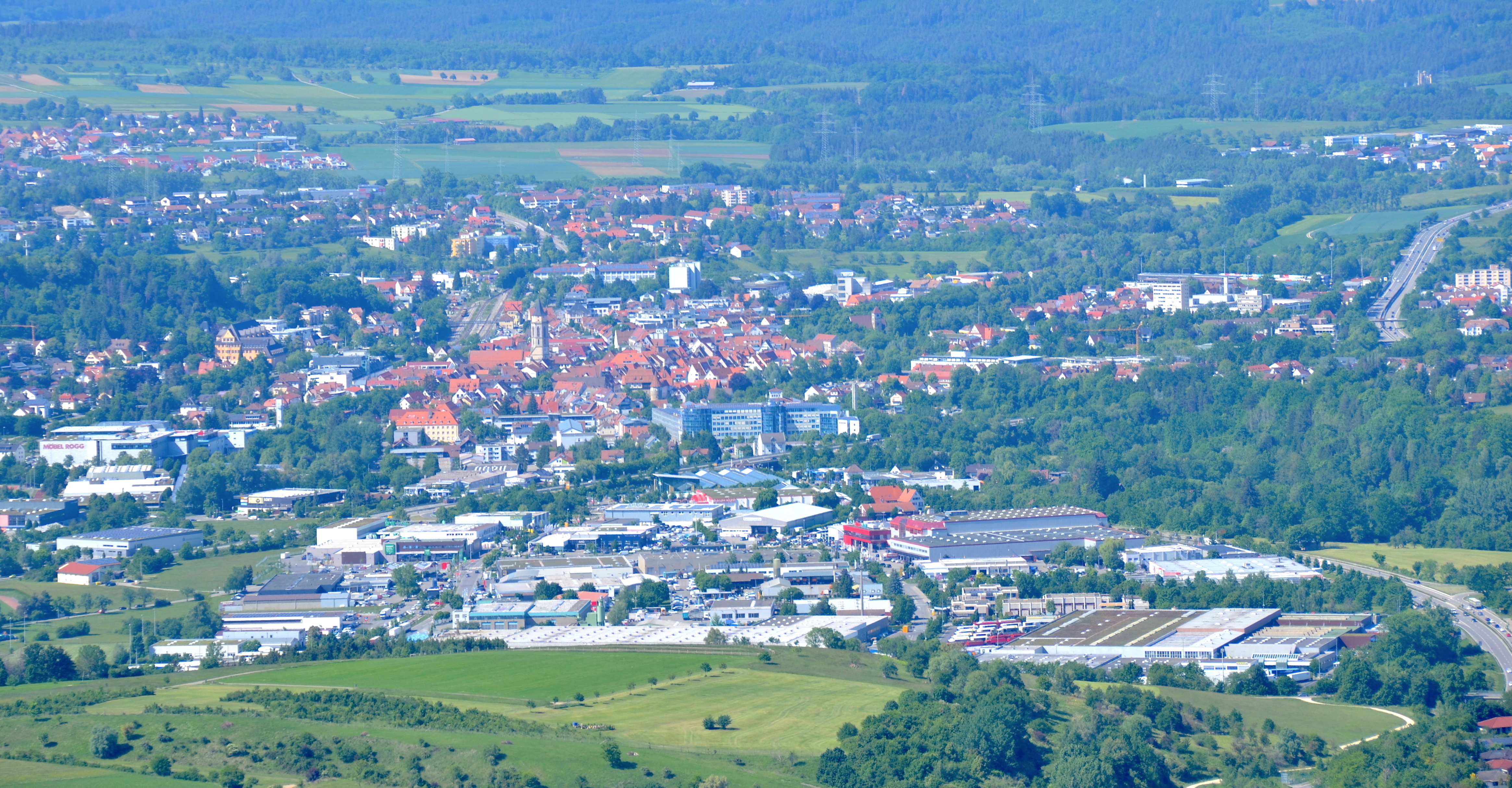 Balingen mit Industriegebiet Gehrn im Vordergrund, rechts die hier vierspurige Bundesstraße 27.